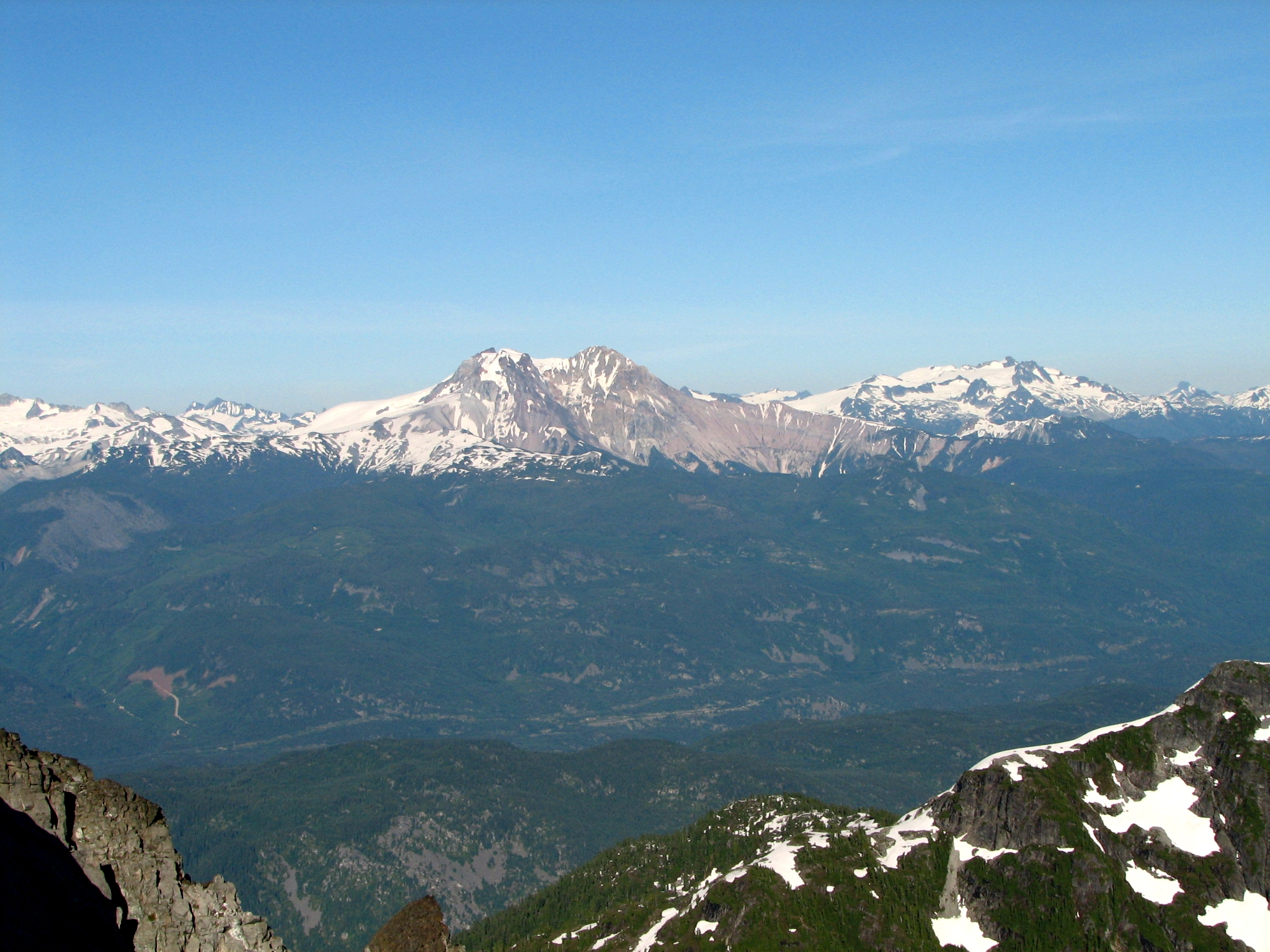 Mount GaribaldiTrips '06 - Tantalus - 07 - Garibaldi fr Pelion-Tantalus col camp